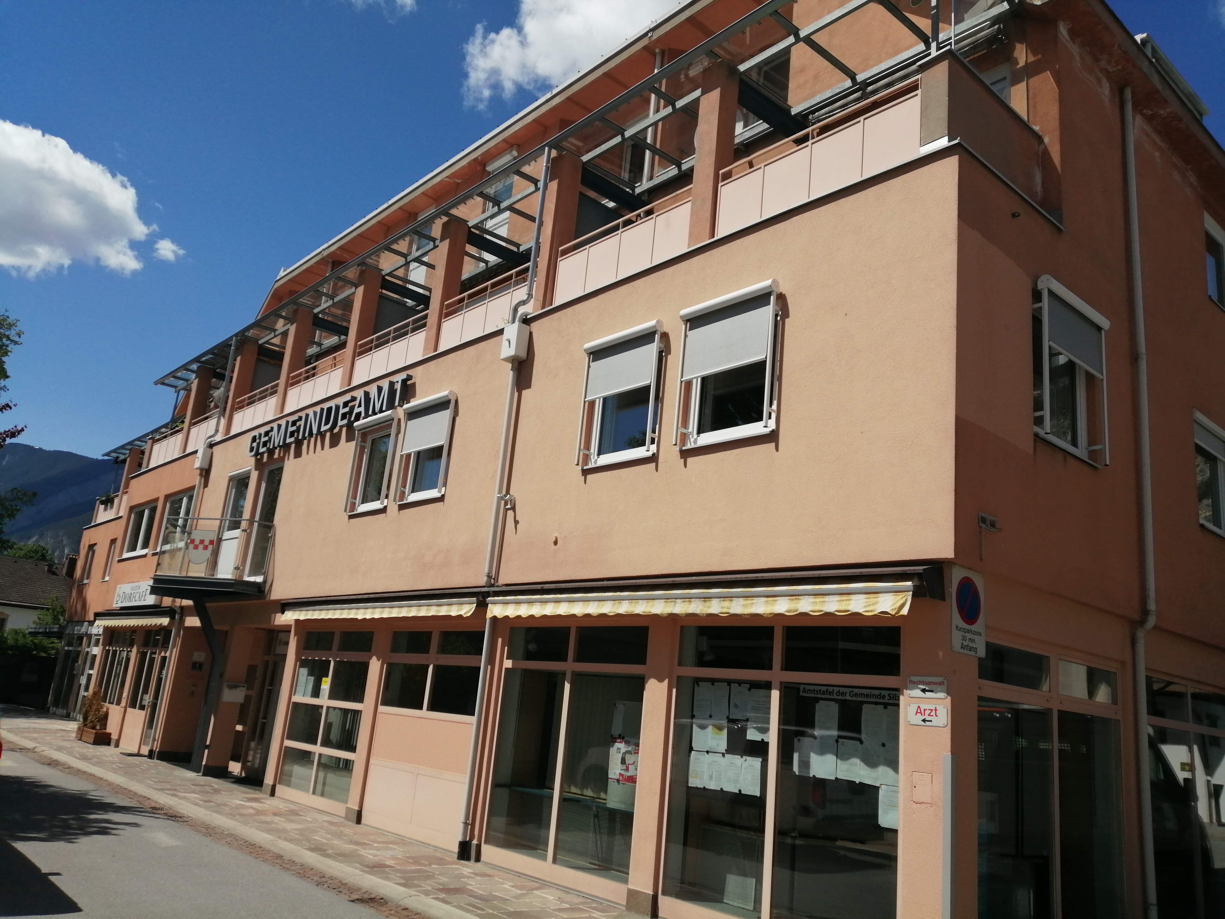 Gemeindeamt der Ortschaft Silz in Tirol, Österreich